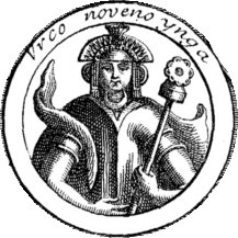 Medaglione con l'effigie di Urco Inca presunto Inca